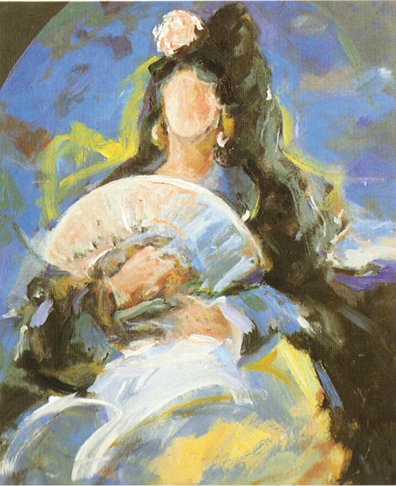 Ruizanglada - Manola en azul 61x50 Acrílico sobre lienzo